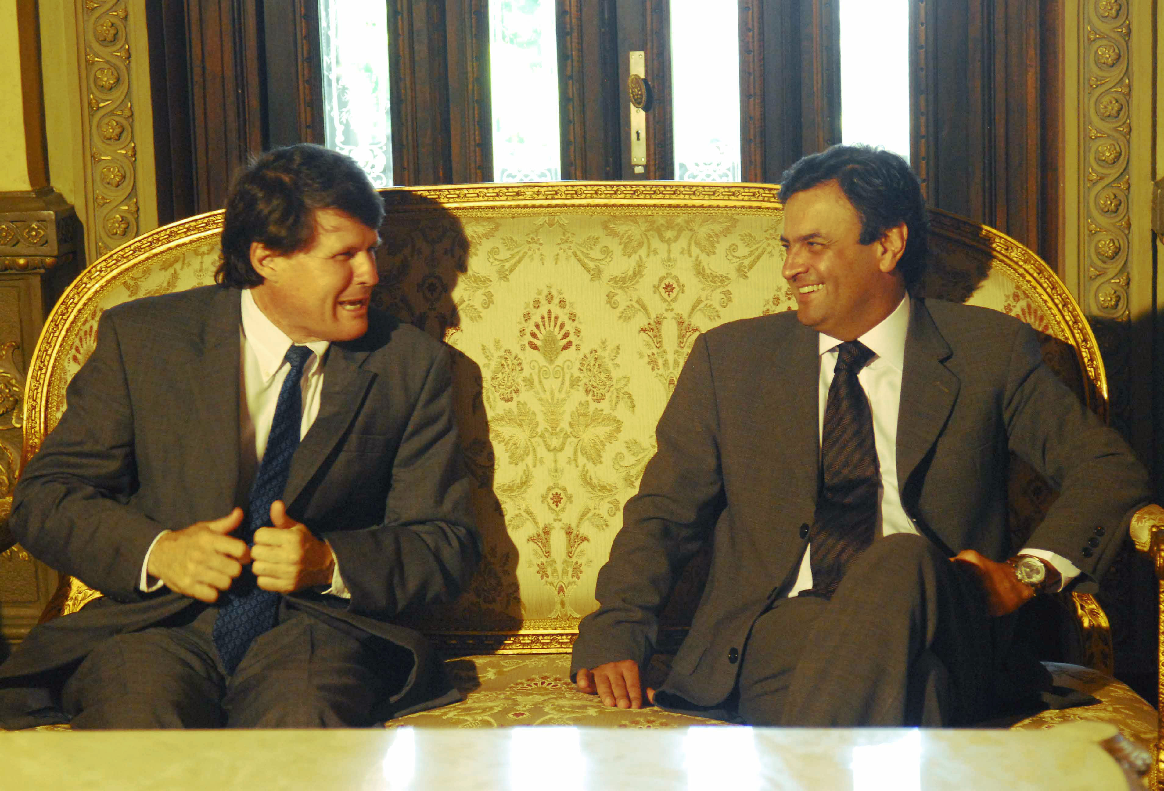 No dia 09/12/08, no Palácio da Liberdade, em Belo Horizonte, o Governador de Minas Gerais, Aécio Neves recebeu o atual Diretor do Banco Mundial (Bird) para o Brasil e para o Caribe, John Briscoe.